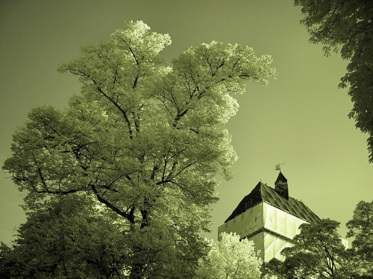 Das Schloß - The Castle Es war spät abends, als K. ankam. Das Dorf lag in tiefem Schnee. Vom Schloßberg war nichts zu sehen, Nebel und Finsternis umgaben ihn, auch nicht der schwächste Lichtschein deutete das große Schloß an. Lange stand K. auf der Holzbrücke, die von der Landstraße zum Dorf führte, und blickte in die scheinbare Leere empor. erste Kapitel Das Schloß.